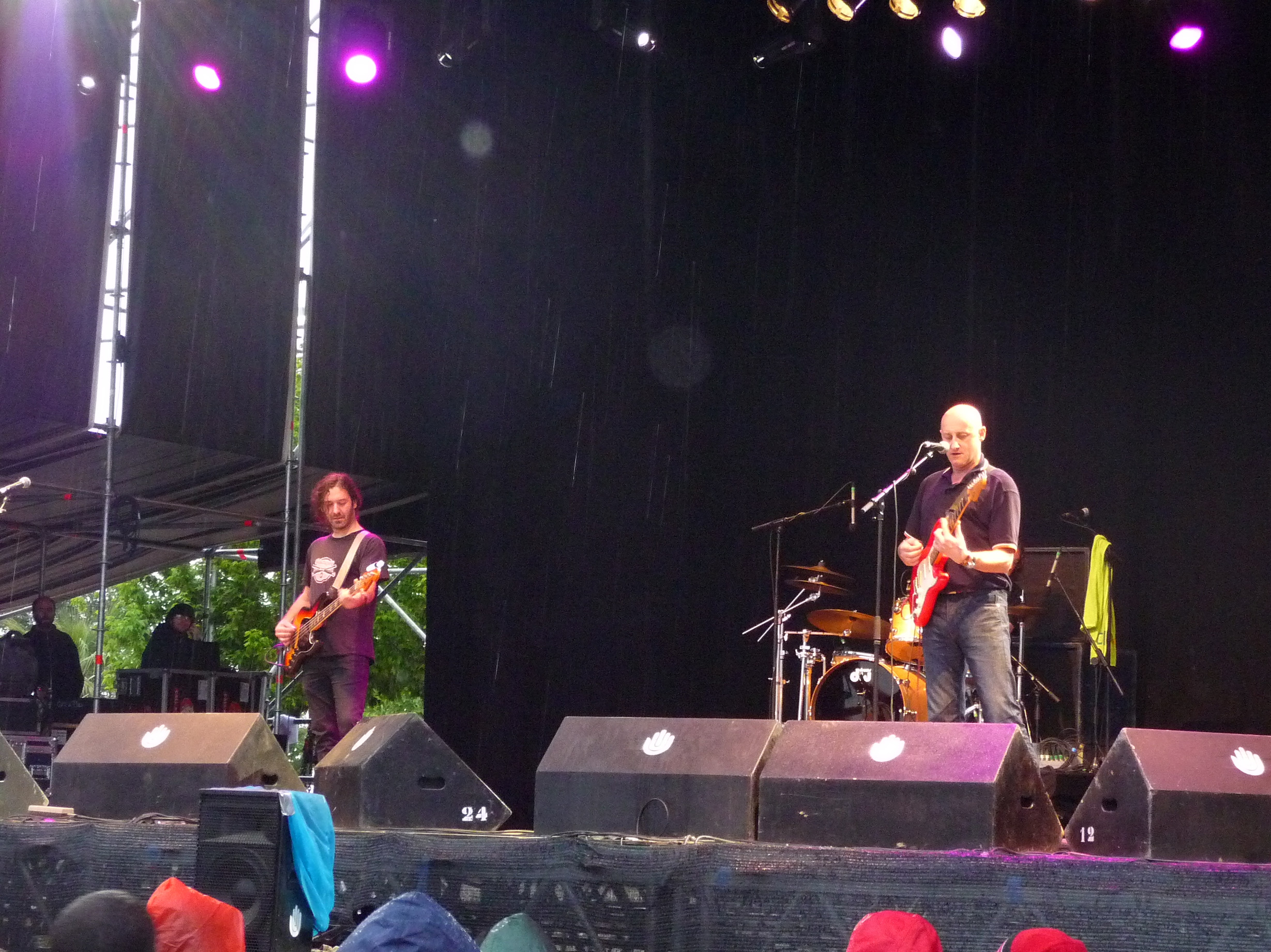 Ilegales en Extremúsika 2009